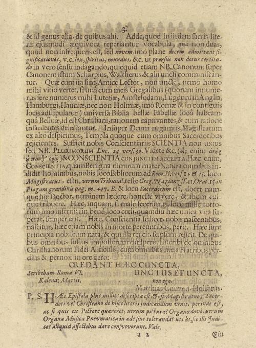 Matthias Knutzen: „Amicus Amicis Amica!“, in: Johann Musaeus: Ableinung der ausgesprengten abscheulichen Verleumbdung/ ob wäre an der Fürstl. Sächsischen Residentz und gesambten Universität Jena eine neue Secte der so genannten Gewissener entstanden/ und derselben eine nicht geringe Anzahl von Studiosis und Bürgern beygethan. Jena: Bielcke; Krebs, 1675, S. 1-3 nach S. 170 [VD17 39:134006G] FB Gotha, Theol 4° 706 (10), S. 3.